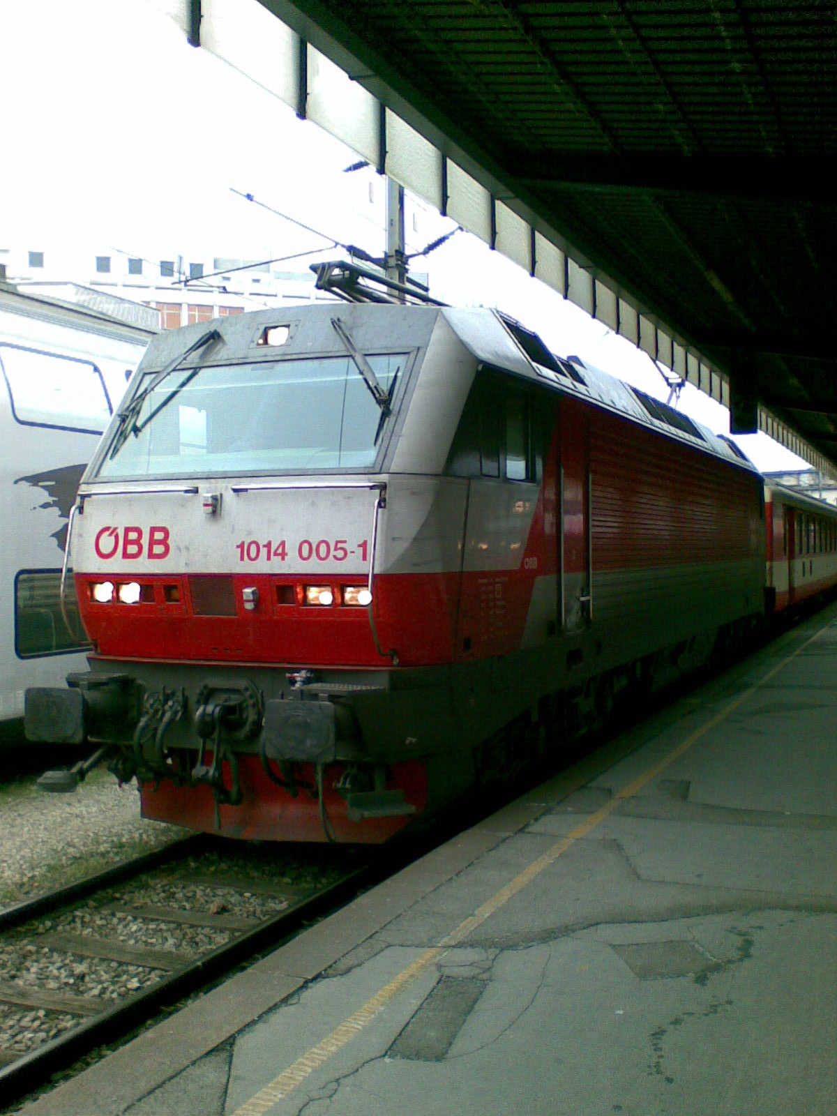 Ex-CAT-1014 005 am 24. Februar 2007 vor ER 9433 in Wien Südbahnhof (Ost)